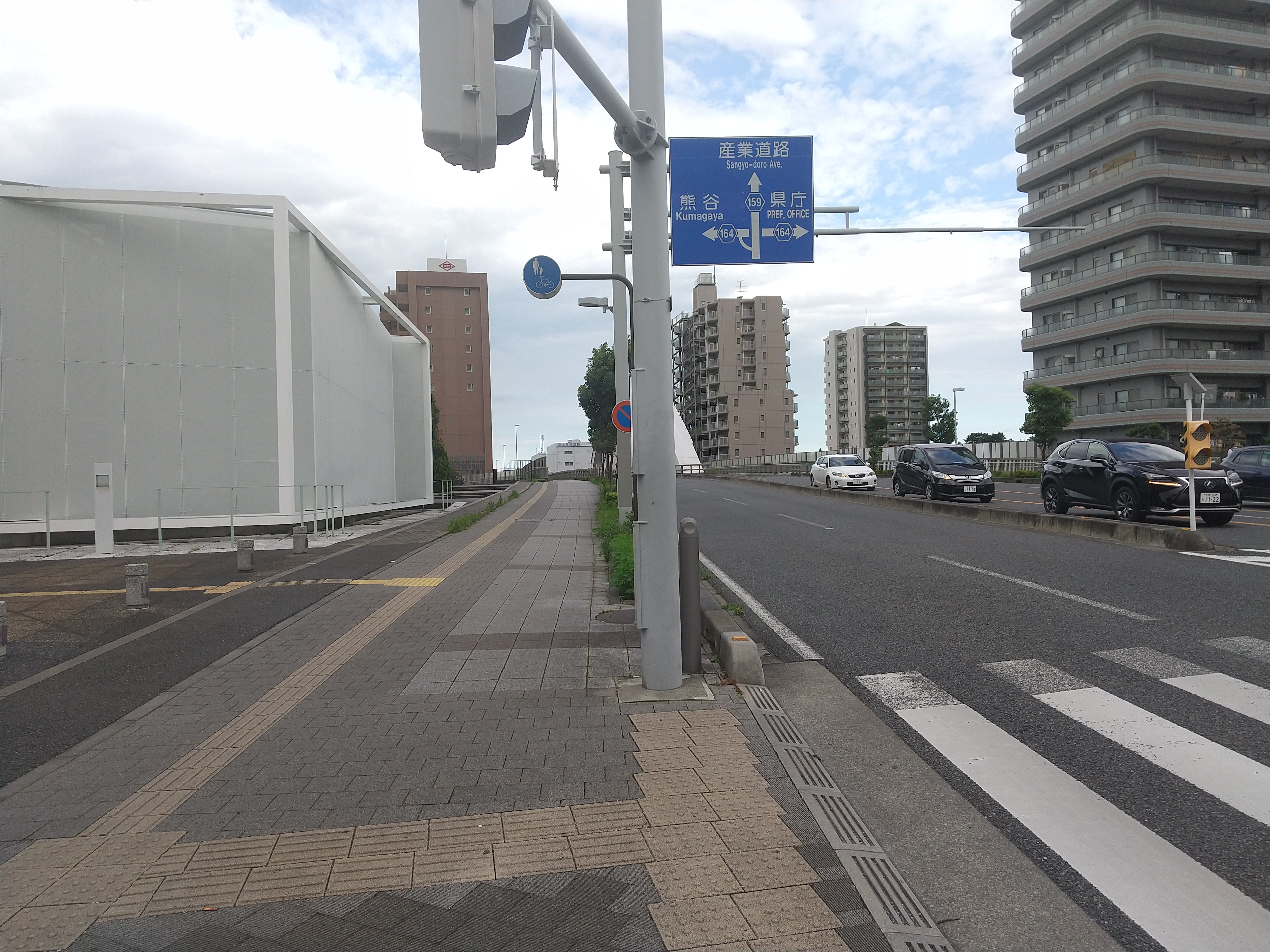 さいたま市浦和区上木崎付近にて